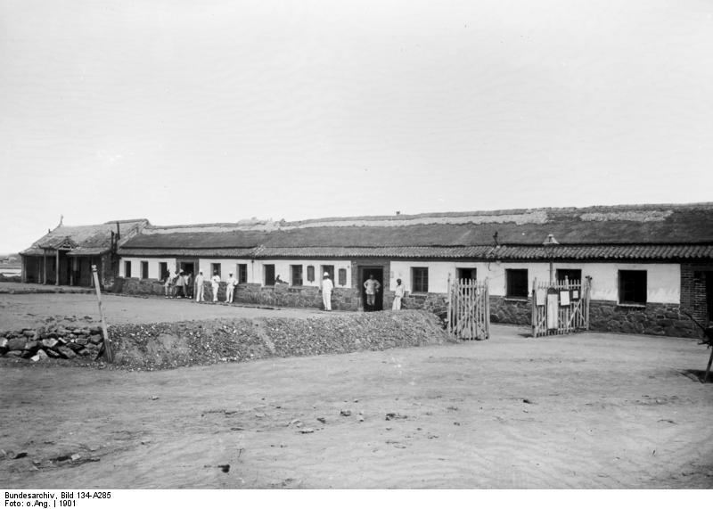 Schutzgebiet Kiautschou Tsingtau 1901: Altes Seezollamt